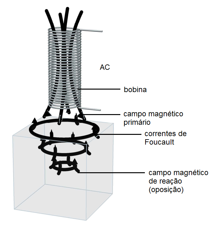 mostra em isométrico a reação em um material ao ser estimulado por um campo magnético virante